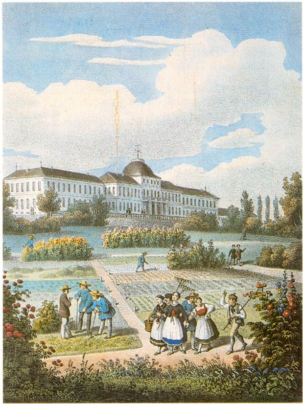 Königlich Württembergisches Land- und Forstwirtschaftliches Institut Hohenheim (Kolorierte Lithographie).